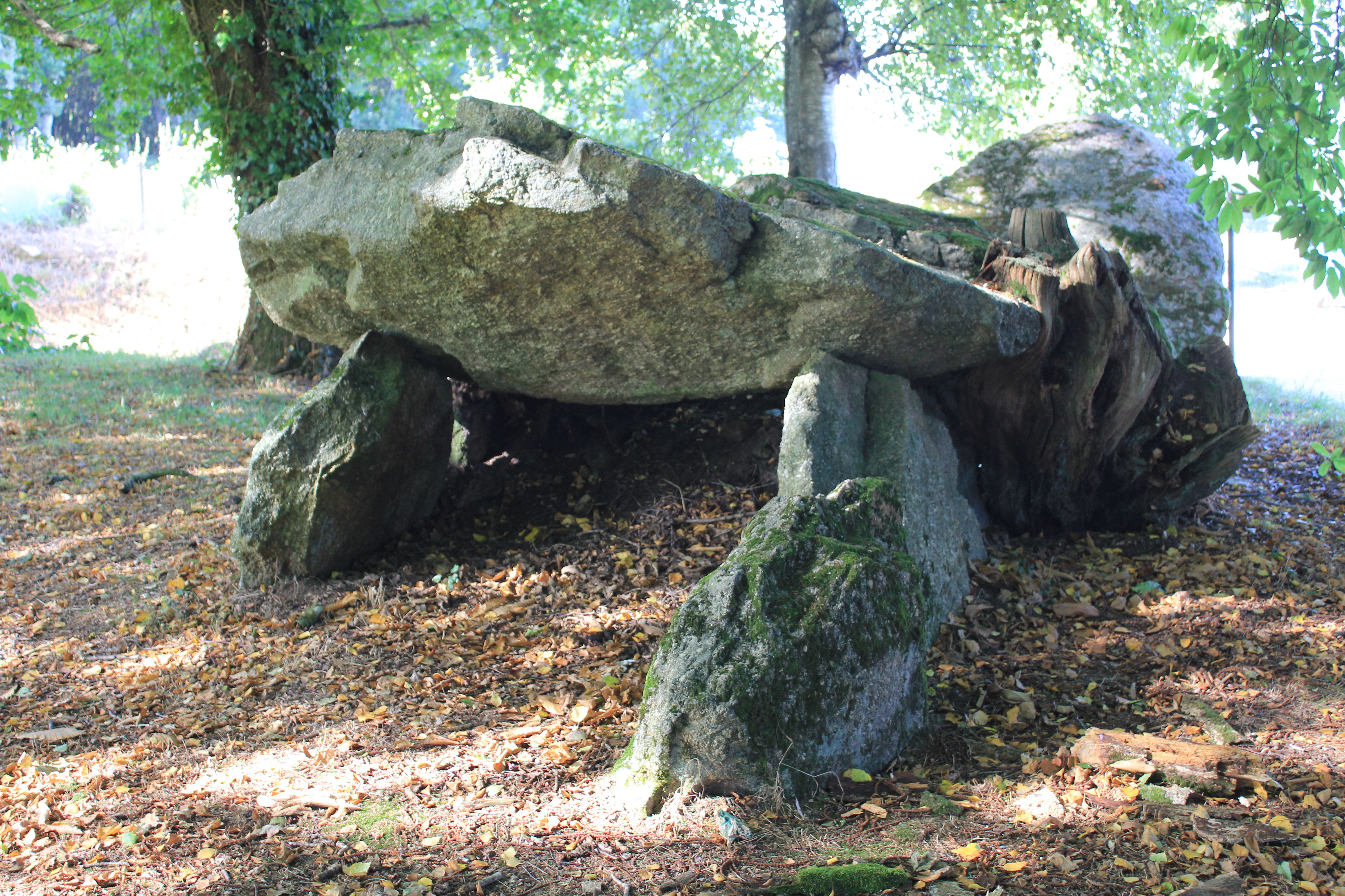 Allée couverte de Kergonfalz, à Bignan, Morbihan, France. .